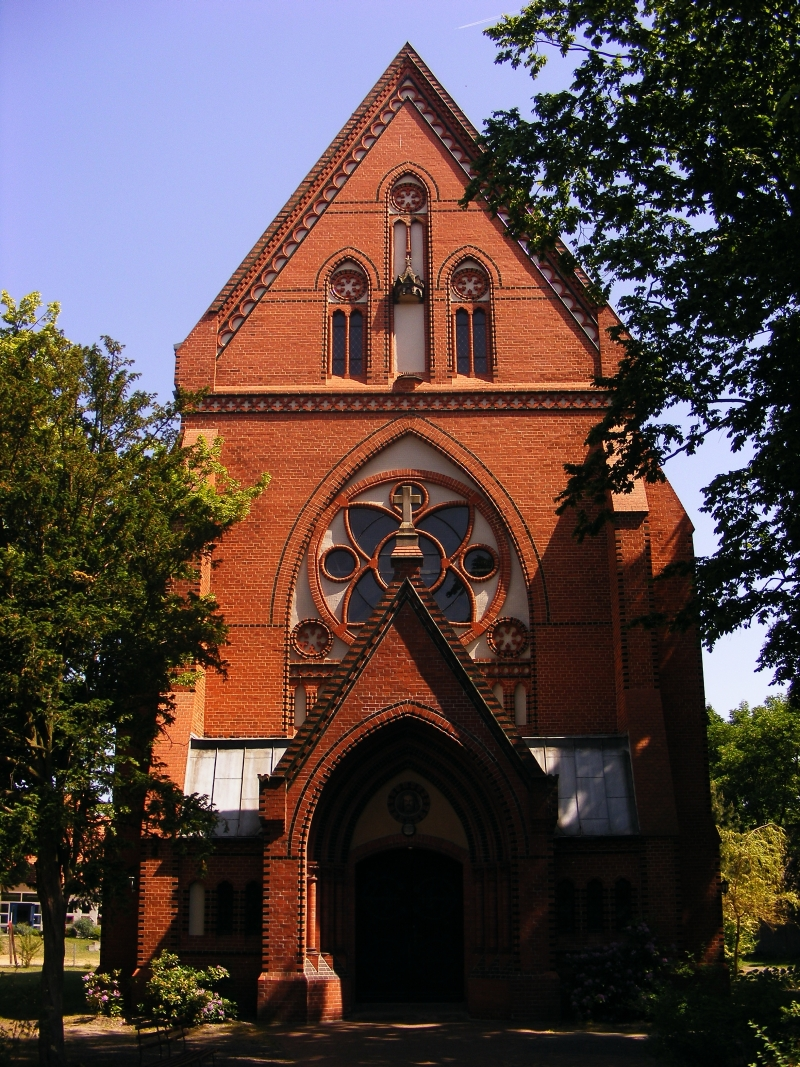 Frontansicht von Sankt Georg